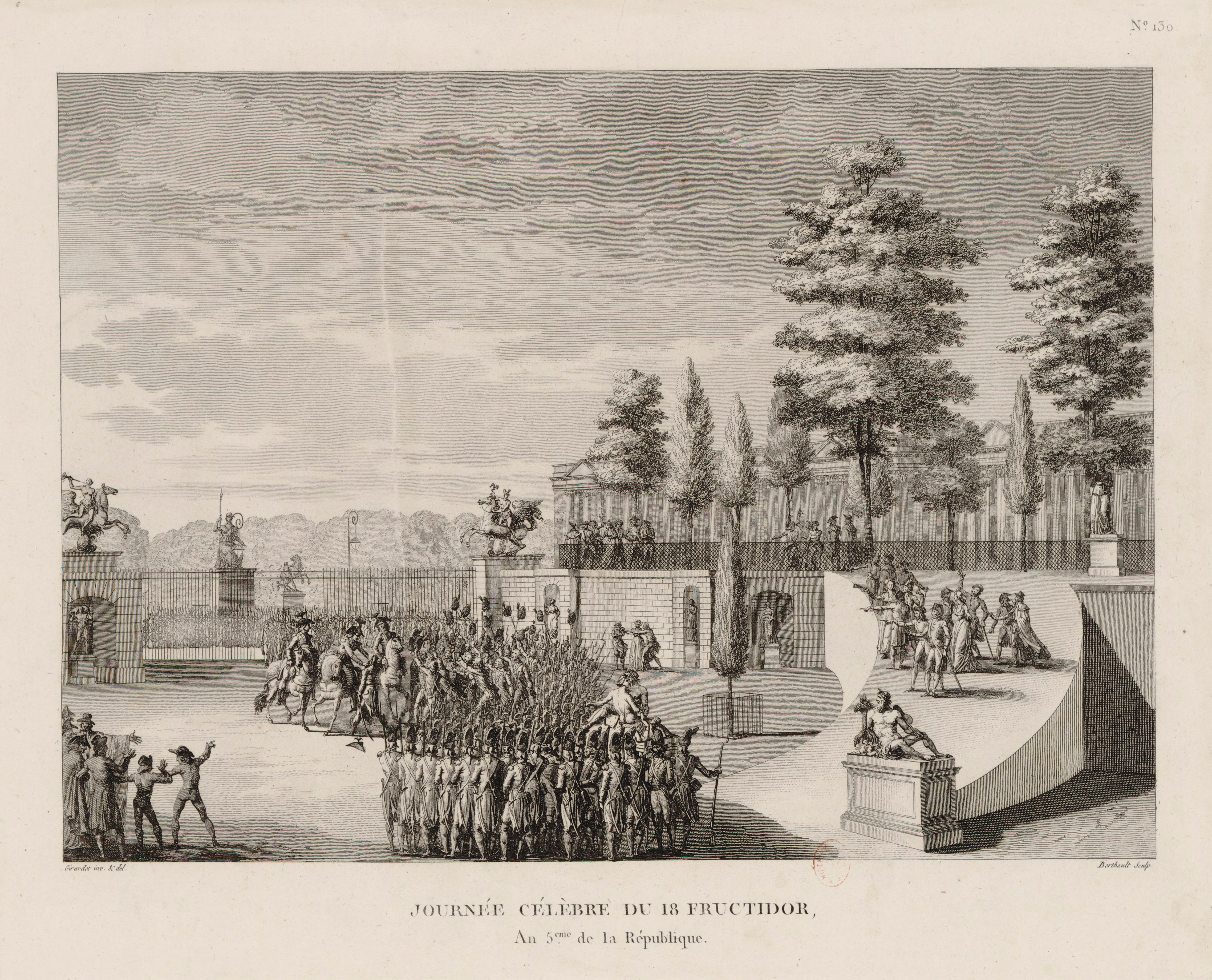 "Journée célèbre du 18 fructidor an 5e de la République". Coup d'État du 18 fructidor an V (4 septembre 1797). L'adjudant-général Jean-Pierre Ramel l'aîné (1768-1815) au jardin des Tuileries. Eau-forte et burin de Pierre-Gabriel Berthault (1737-1831) d'après Abraham Girardet (1763-1823).